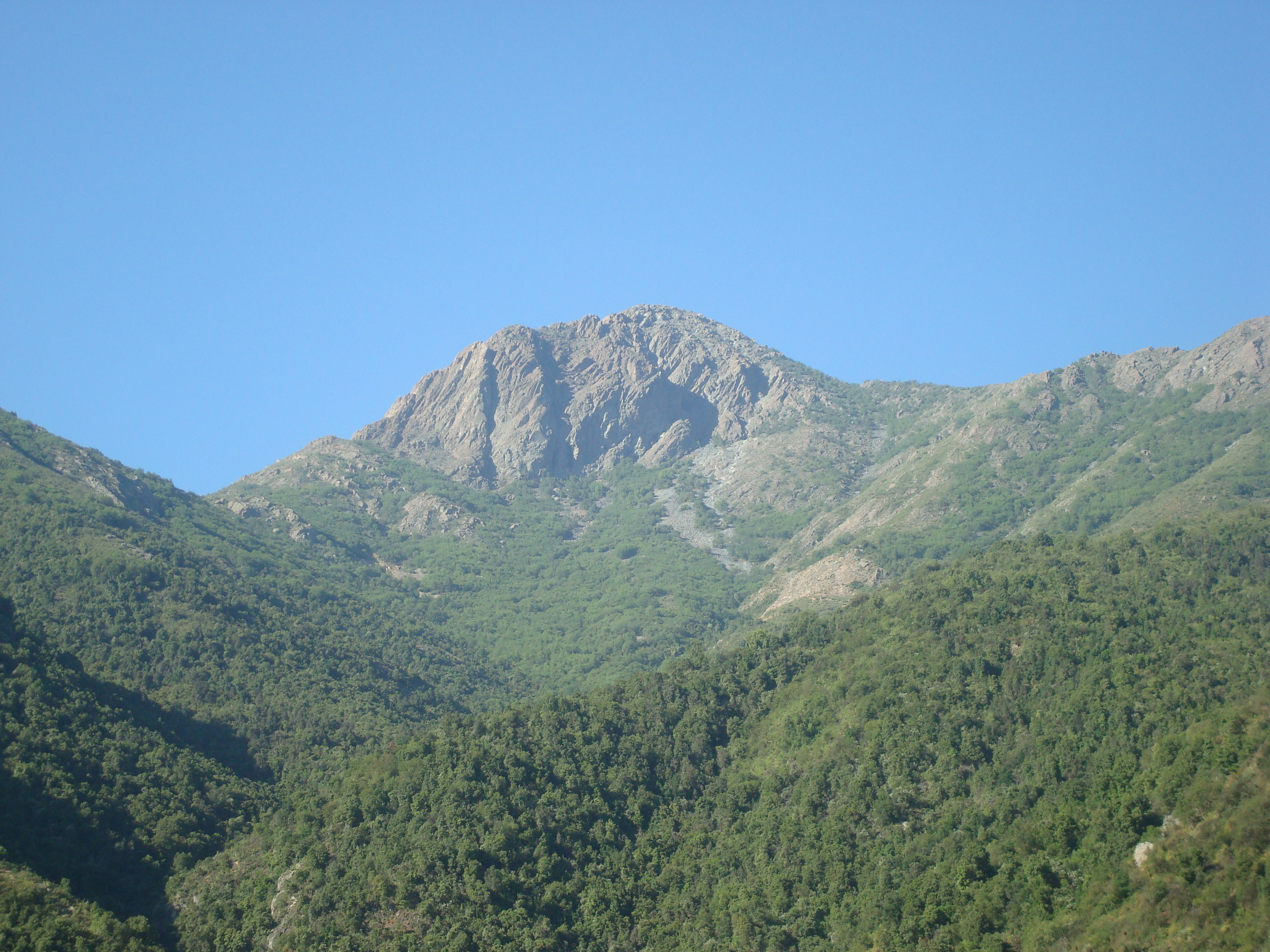 Cerro La Campana desde Granizo, Olmué, Chile. En Parque Nacional La Campana.